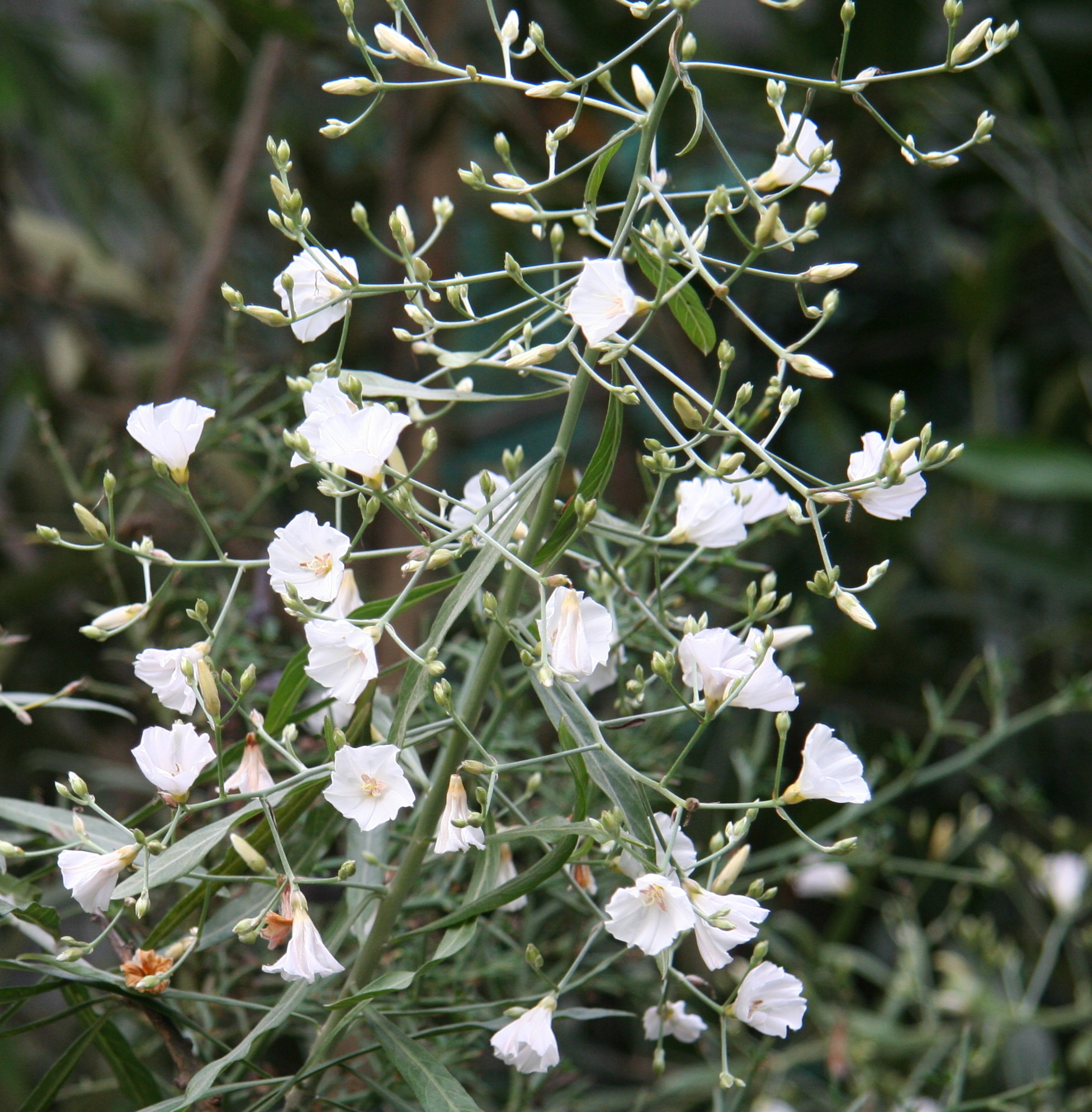 Convolvulus floridus im Botanischen Garten Dresden